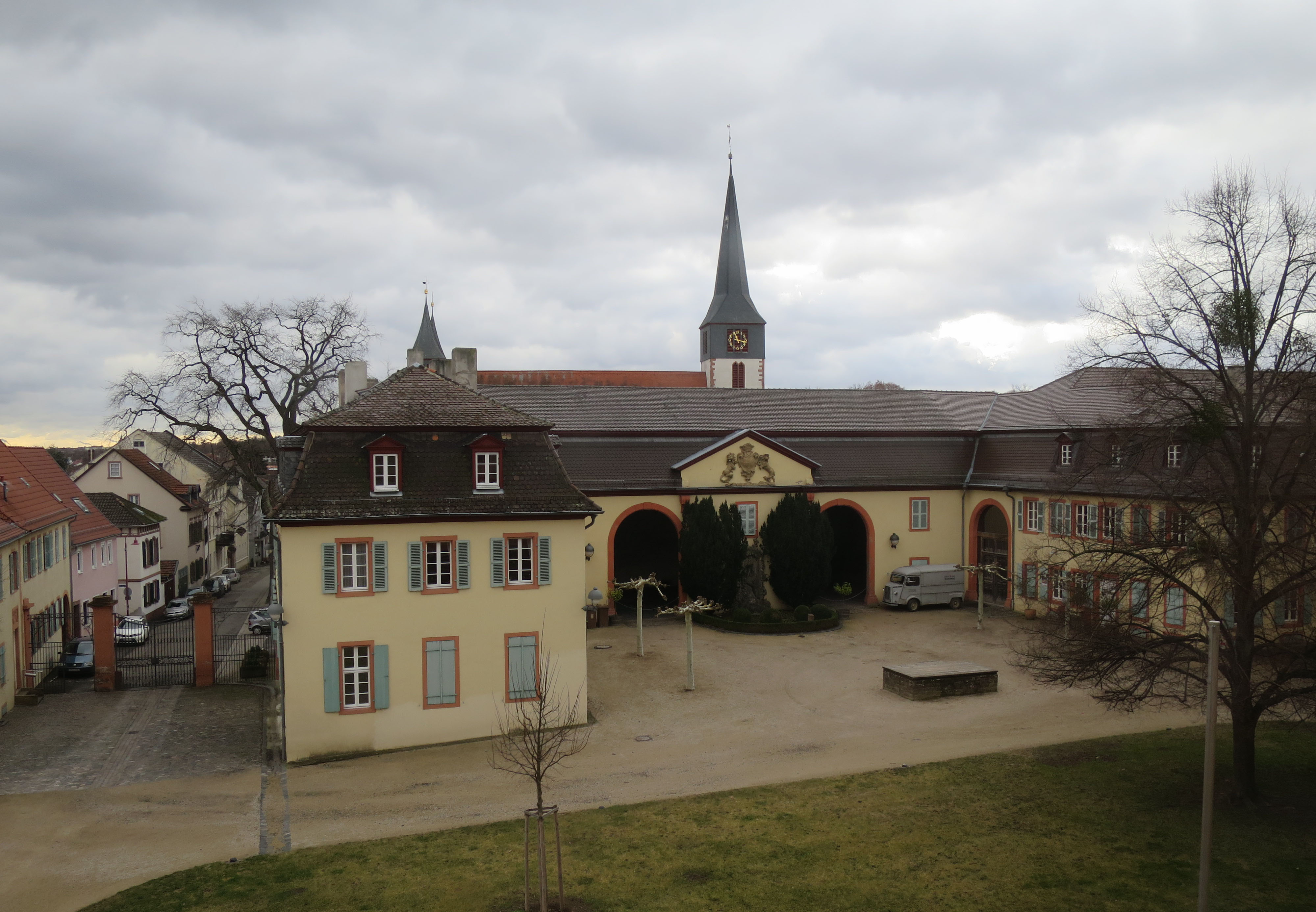 Schloss Herrnsheim, Wirtschaftshof und Peterskirche